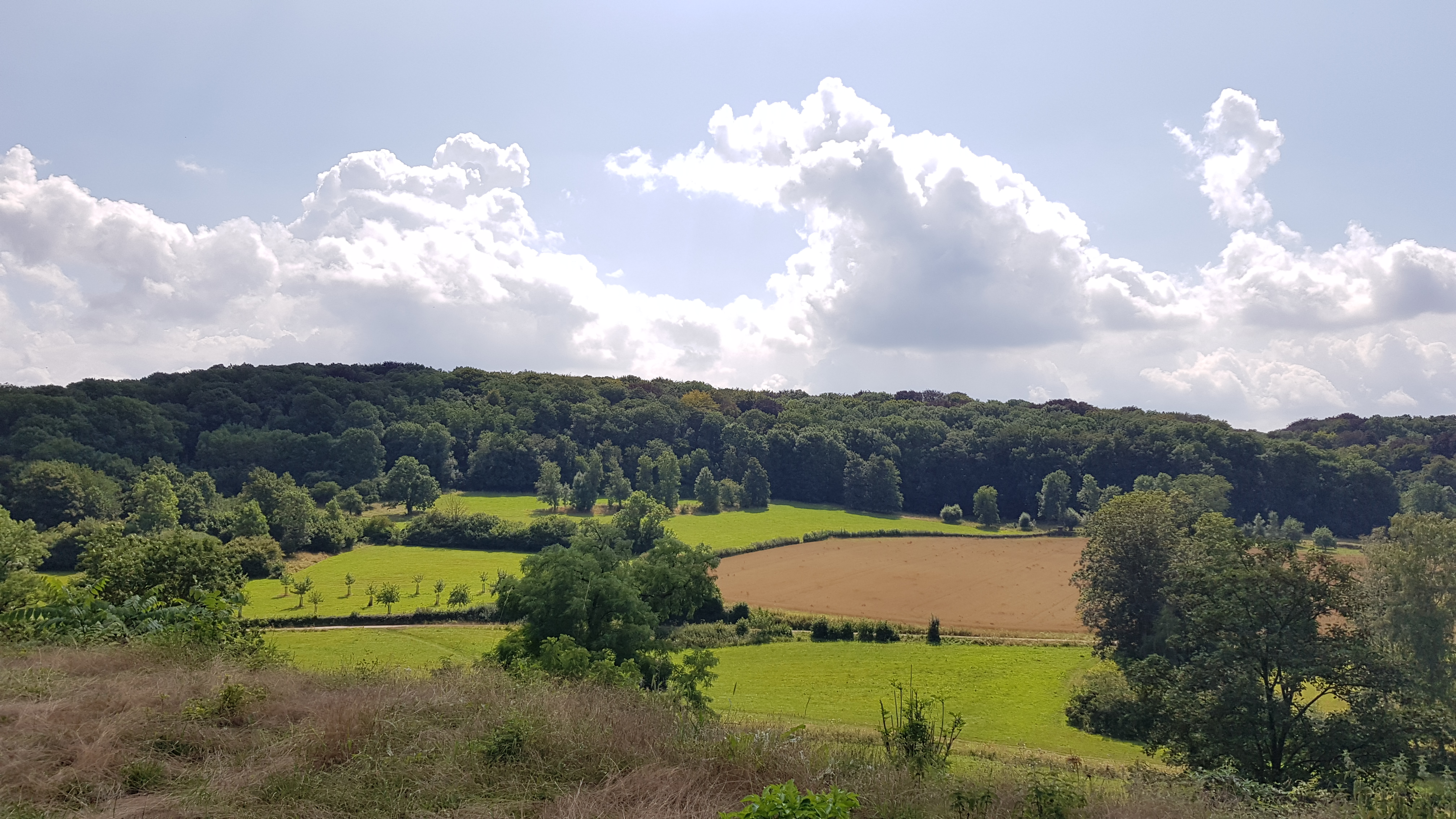 uitzicht vanaf Huis De Beuk in het Savelsbos, Gronsveld, Nederland